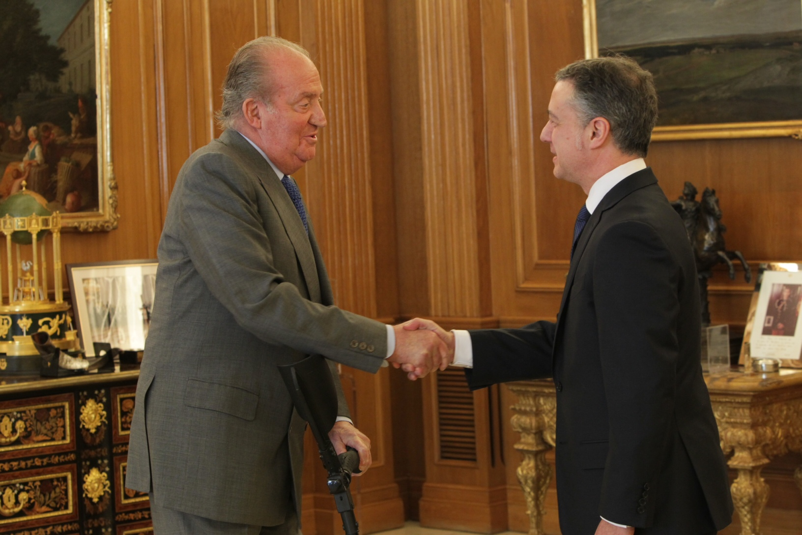 El Lehendakari ha sido recibido por el Rey en el Palacio de la Zarzuela